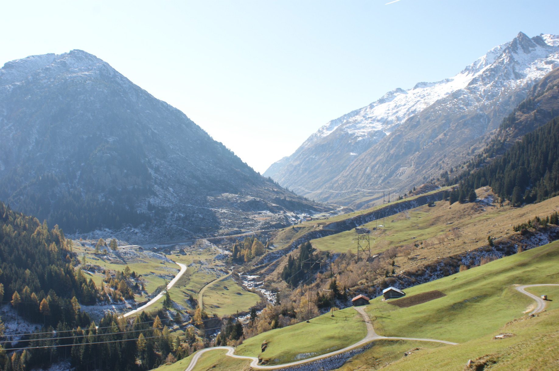 Val Medel zwische Acla und Sogn Gions. Piz Curvet links und Tgiern Sogn Gions am Piz Gannaretsch rechts.